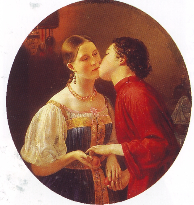 Фаддей Антонович Горецкий. Христосование. 1850. ГРМ